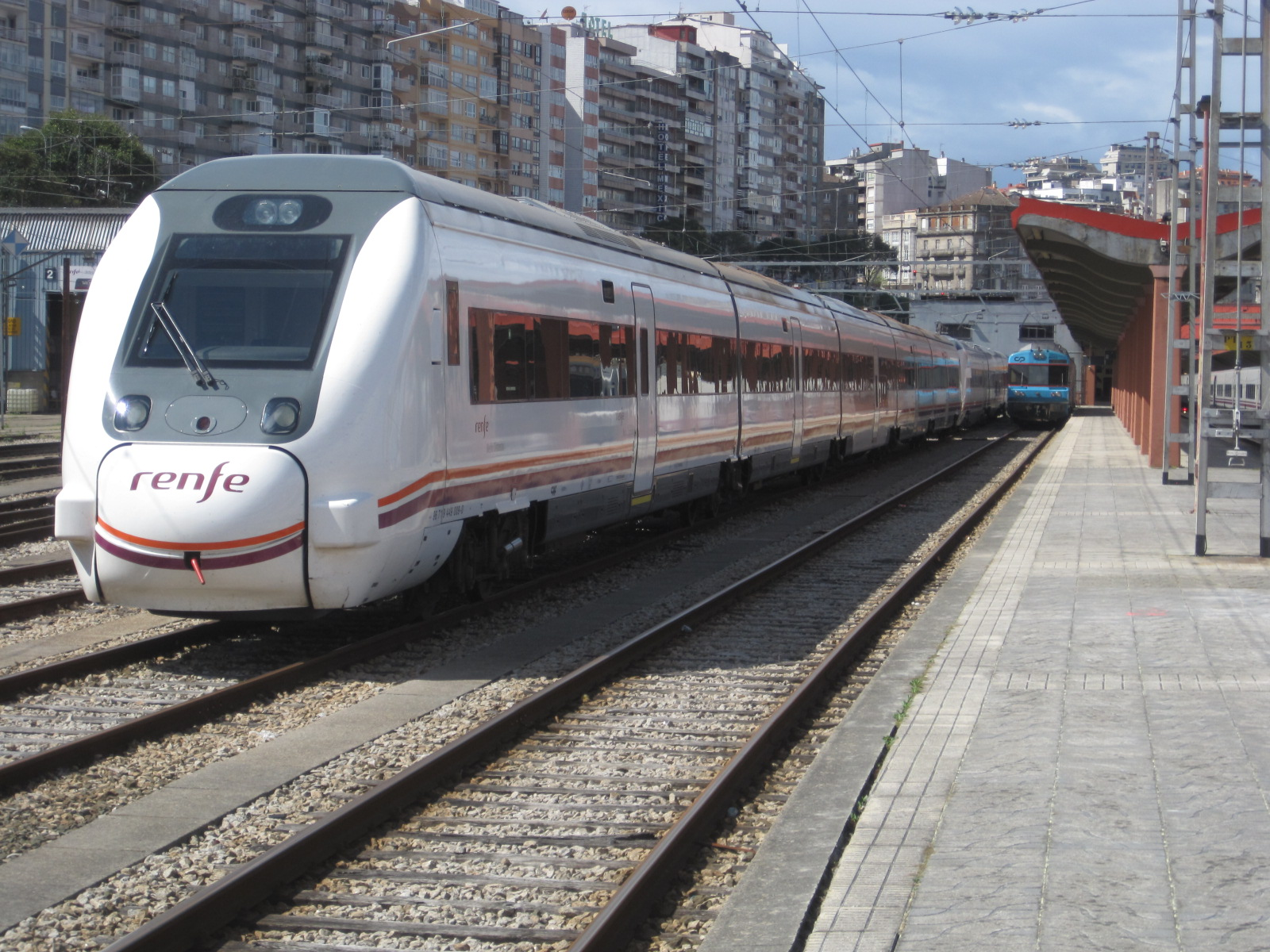 Media Distancia Vigo-León